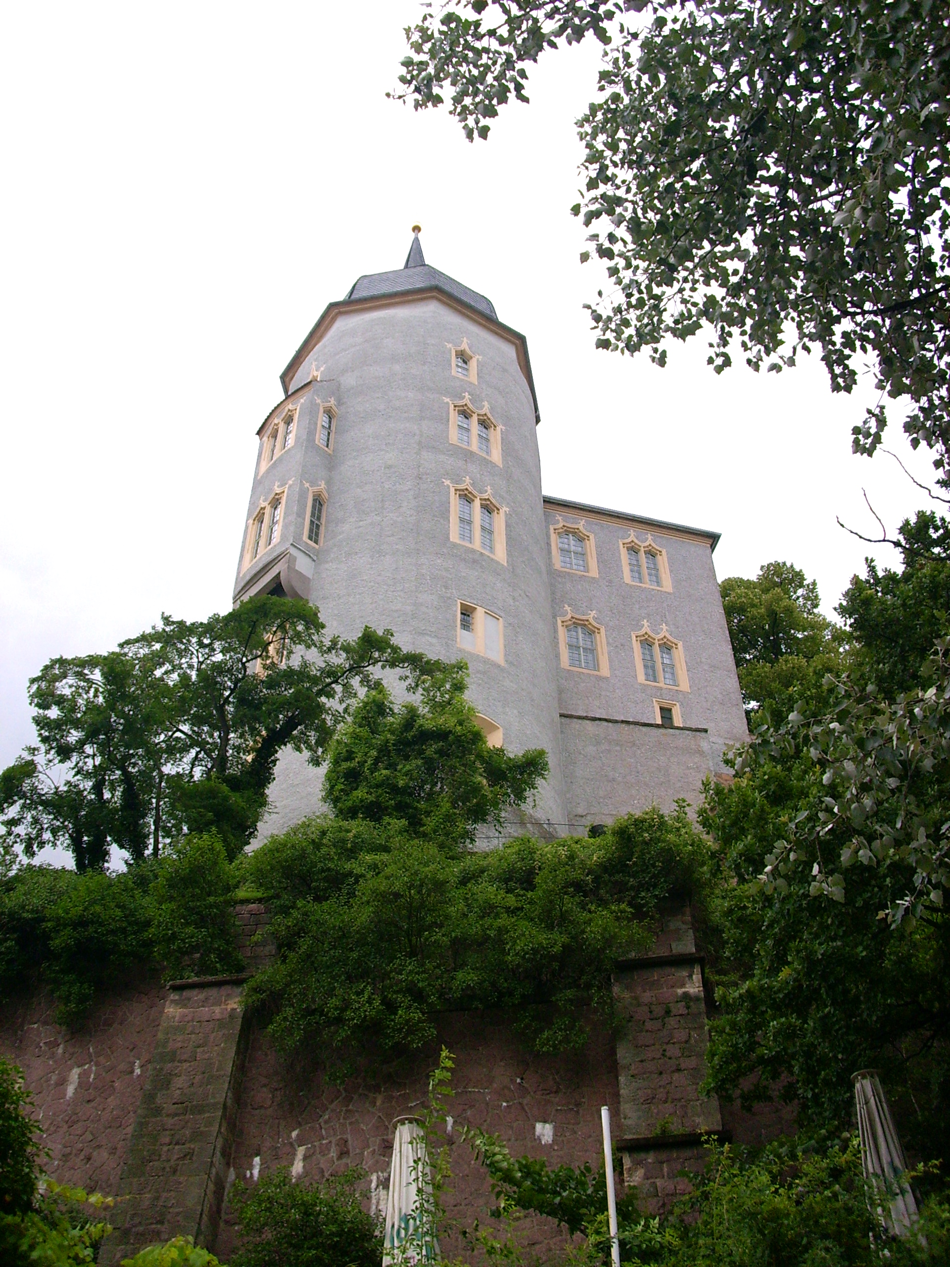 Bischofschloss, Domplatz 3 in Meißen